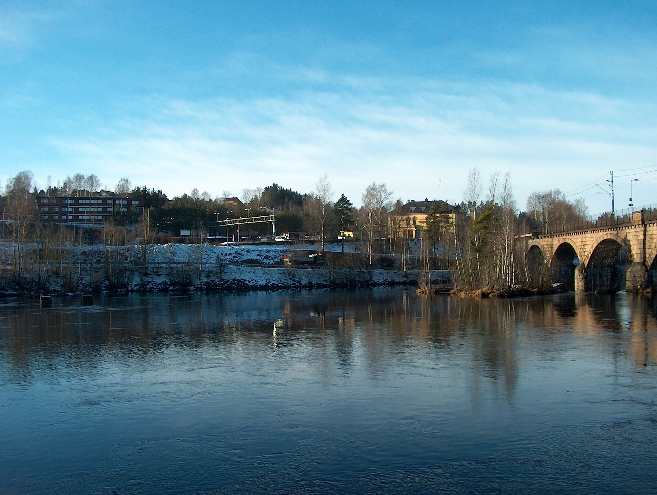 Begna bru (Begna Bridge), jernbanebrua over Ådalselva (a railway bridge past River Begna)